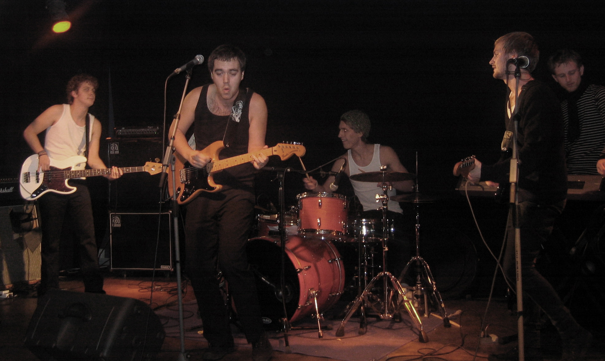 Spring Johnny! under en konsert i Örebro 2006.